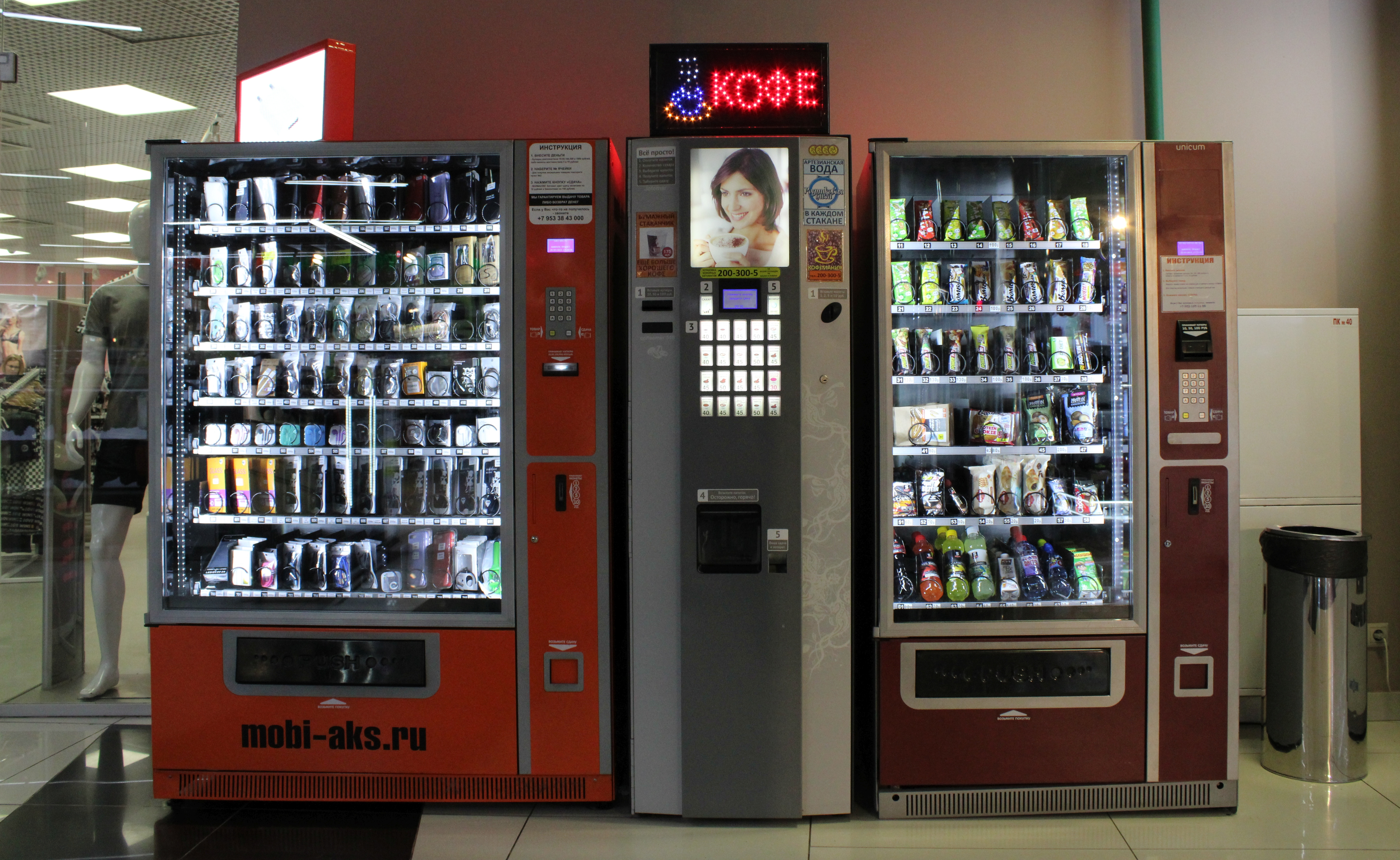 Торговые автоматы в торгово-развлекательном комплексе (ТРК) «Глобус» (Екатеринбург, улица Щербакова, 4)